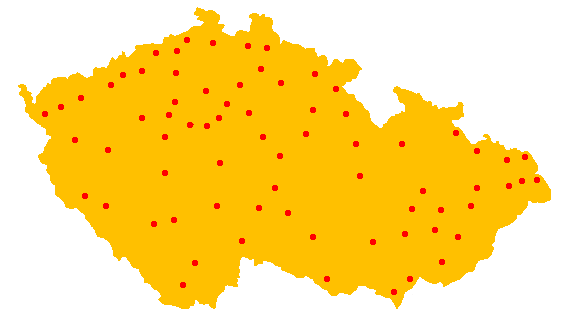 Síť 72 babyboxů v České republice ke 24.11.2017